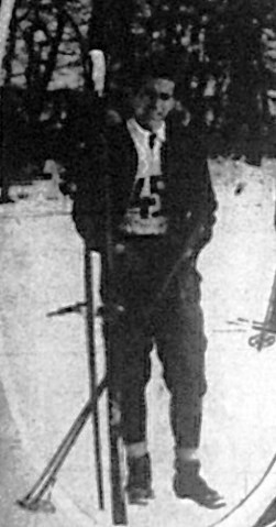 Déván István magyar atléta, síelő, újságíró, lapszerkesztő.